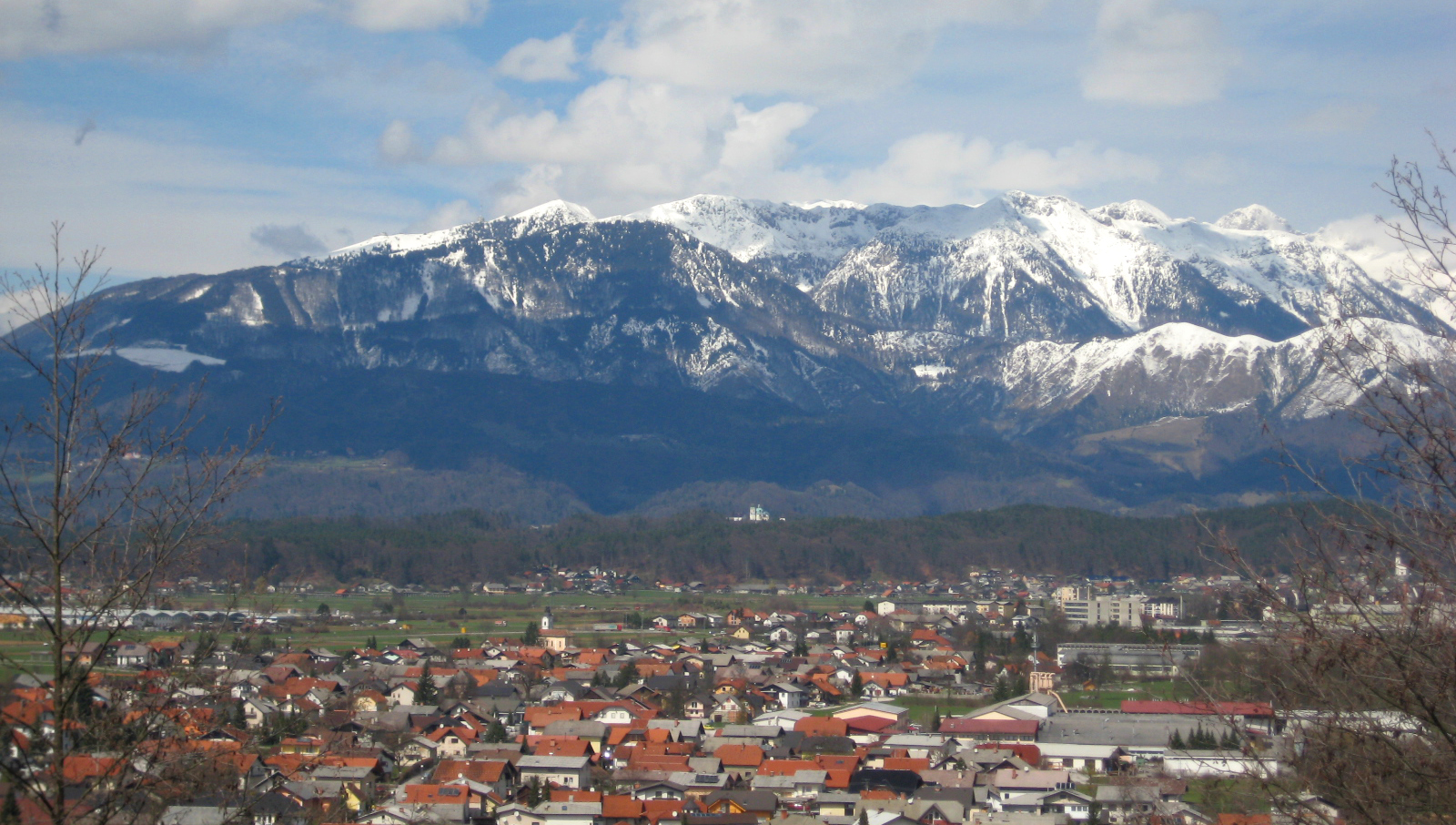 Nožice and Duplica, villages near Kamnik, Slovenia